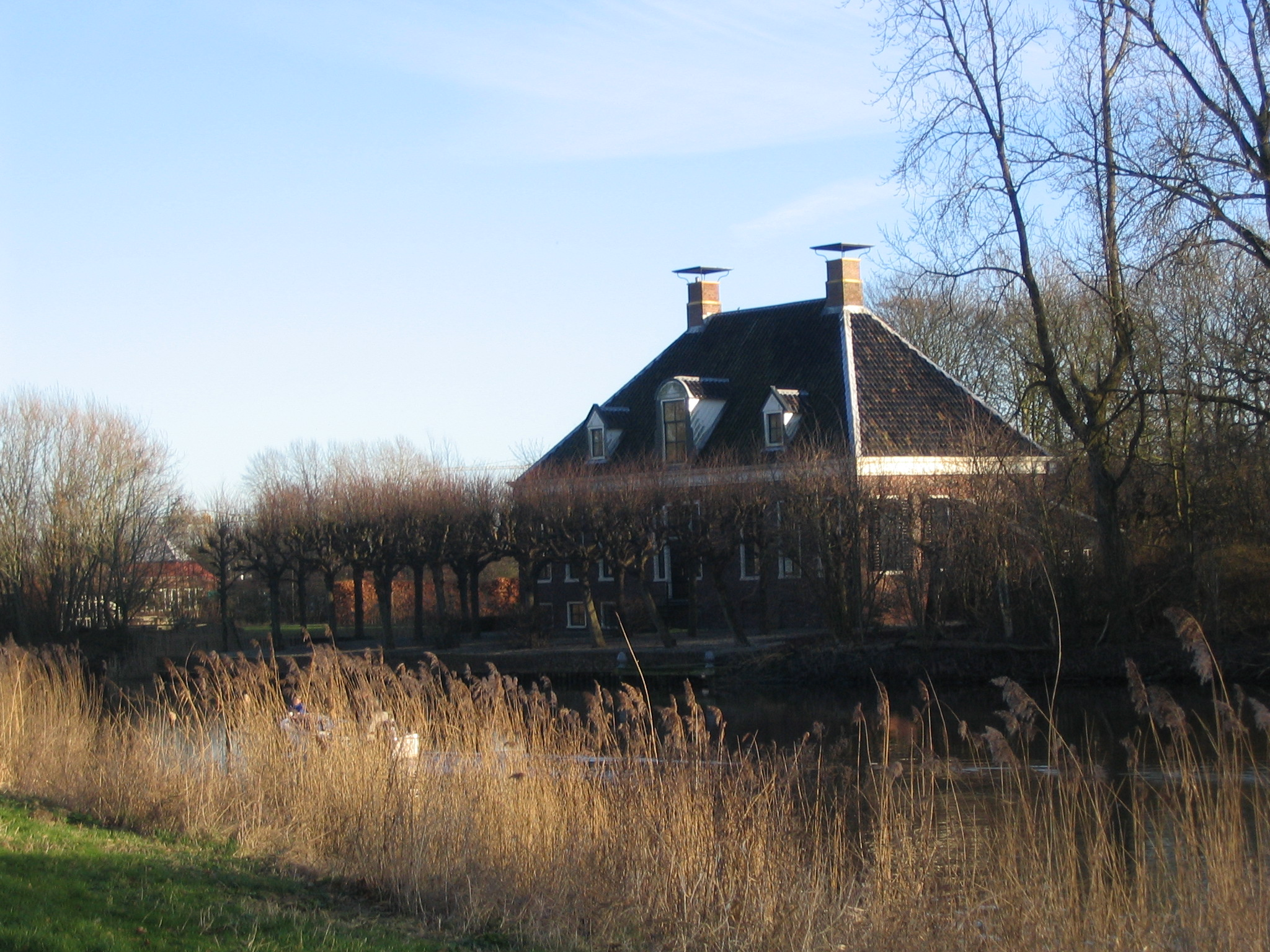 De borg Vliethoven bij Delfzijl